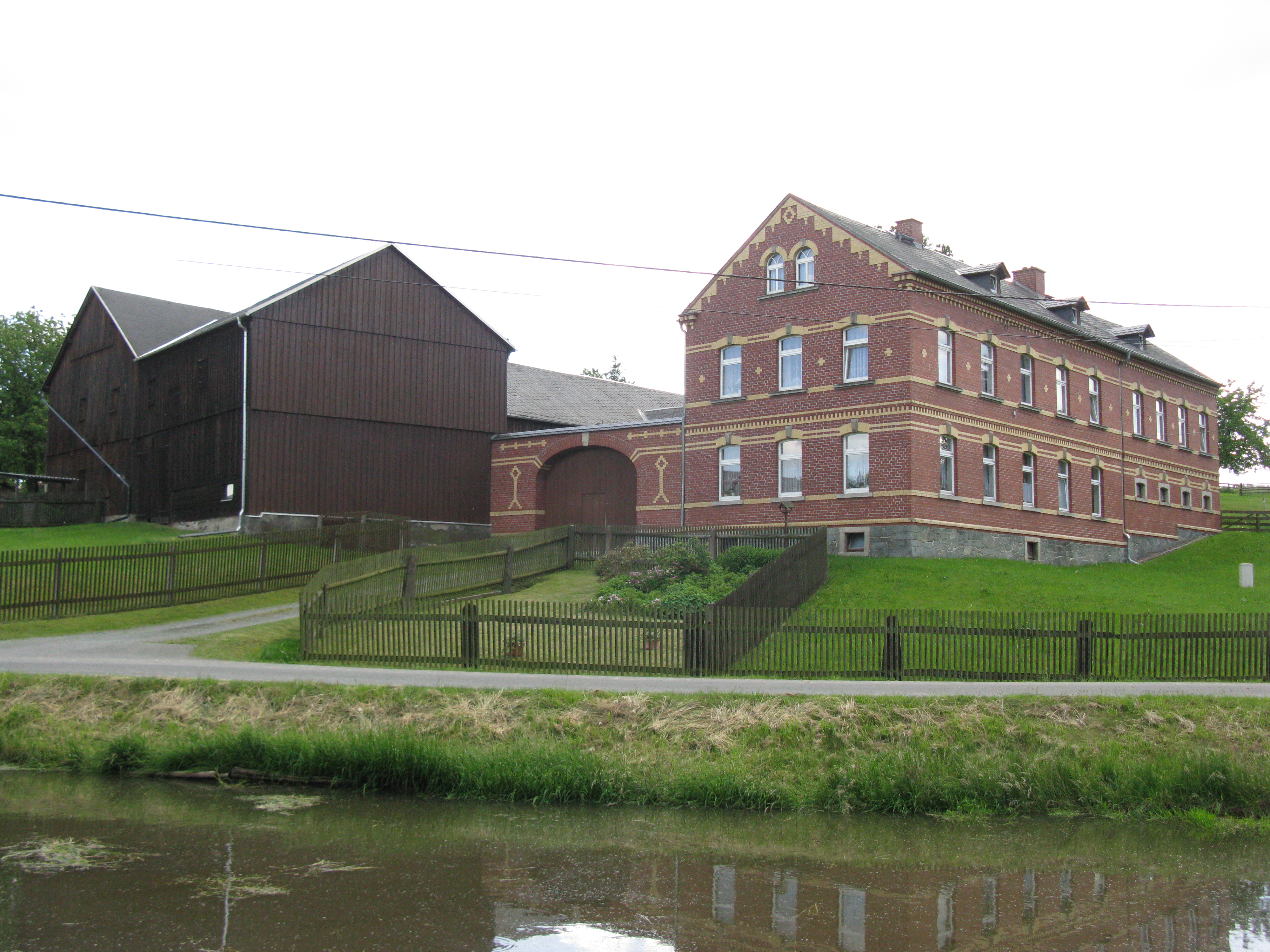 Rosenbach/Vogtl., Ortsteil Drochaus: Denkmalgeschütztes Haus an der Oberpirker Straße 14 (Sächsische Denkmal-ID:09231957)